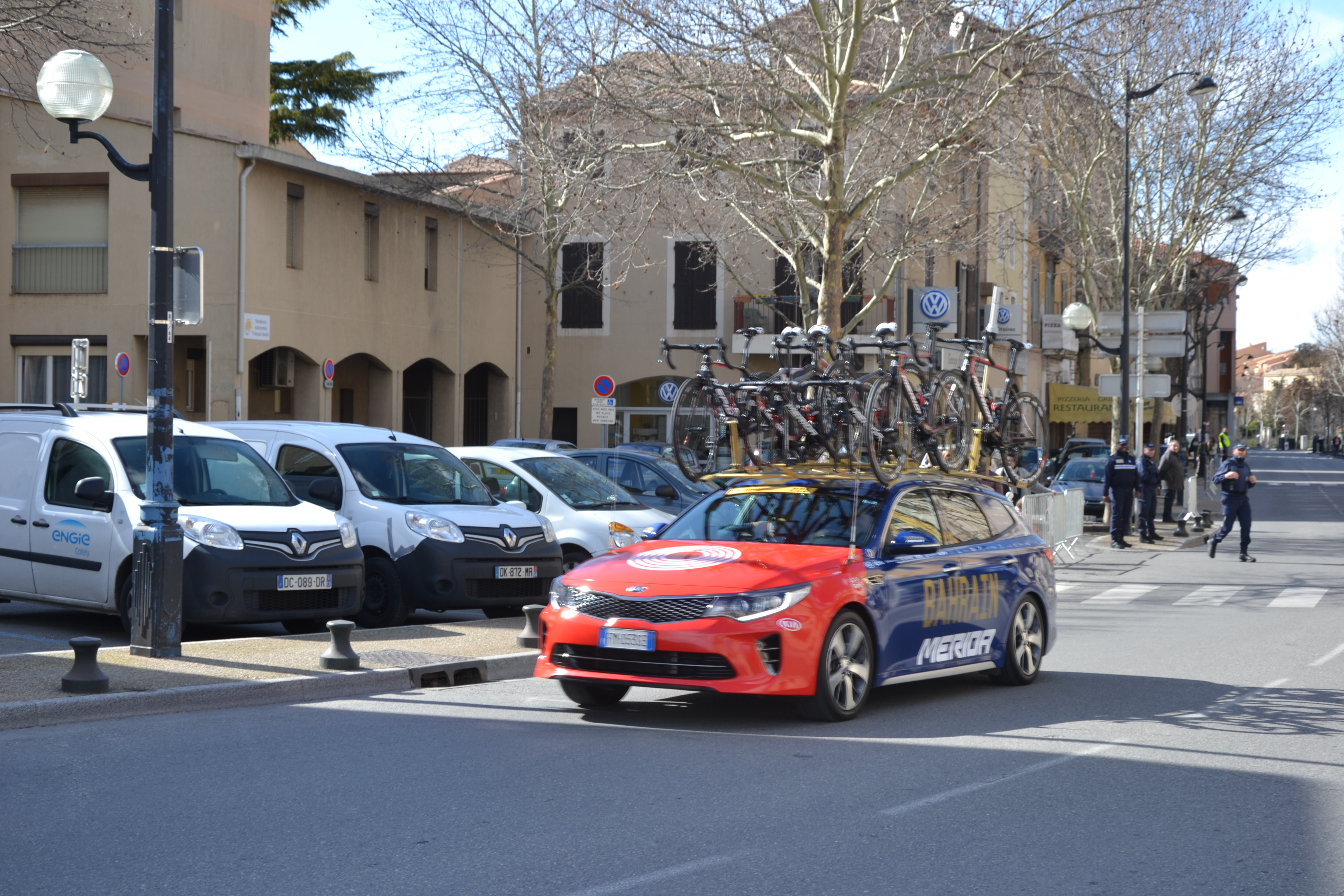 lors de la 5ème étape du Paris-Nice 2018, à Apt